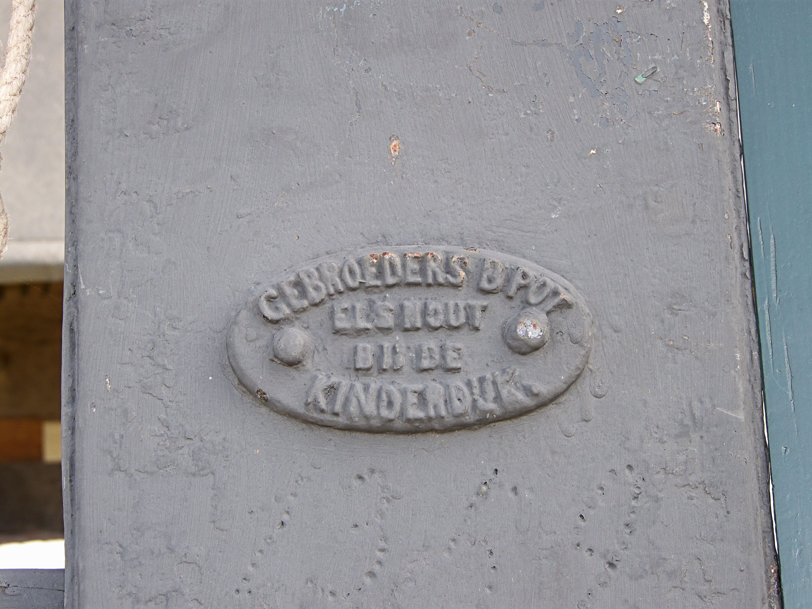 Standerdmolen Den Evert, roeplaatje met runnumer 1359